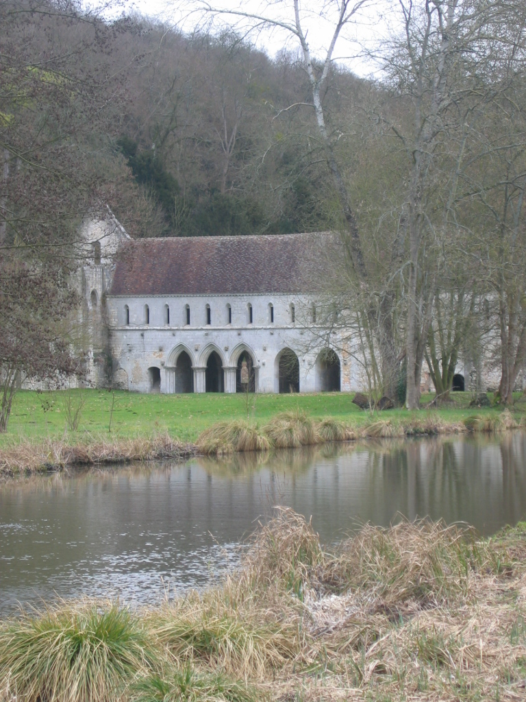 Abbaye de Fontaine Guérard, Eure, sur l'Andelle